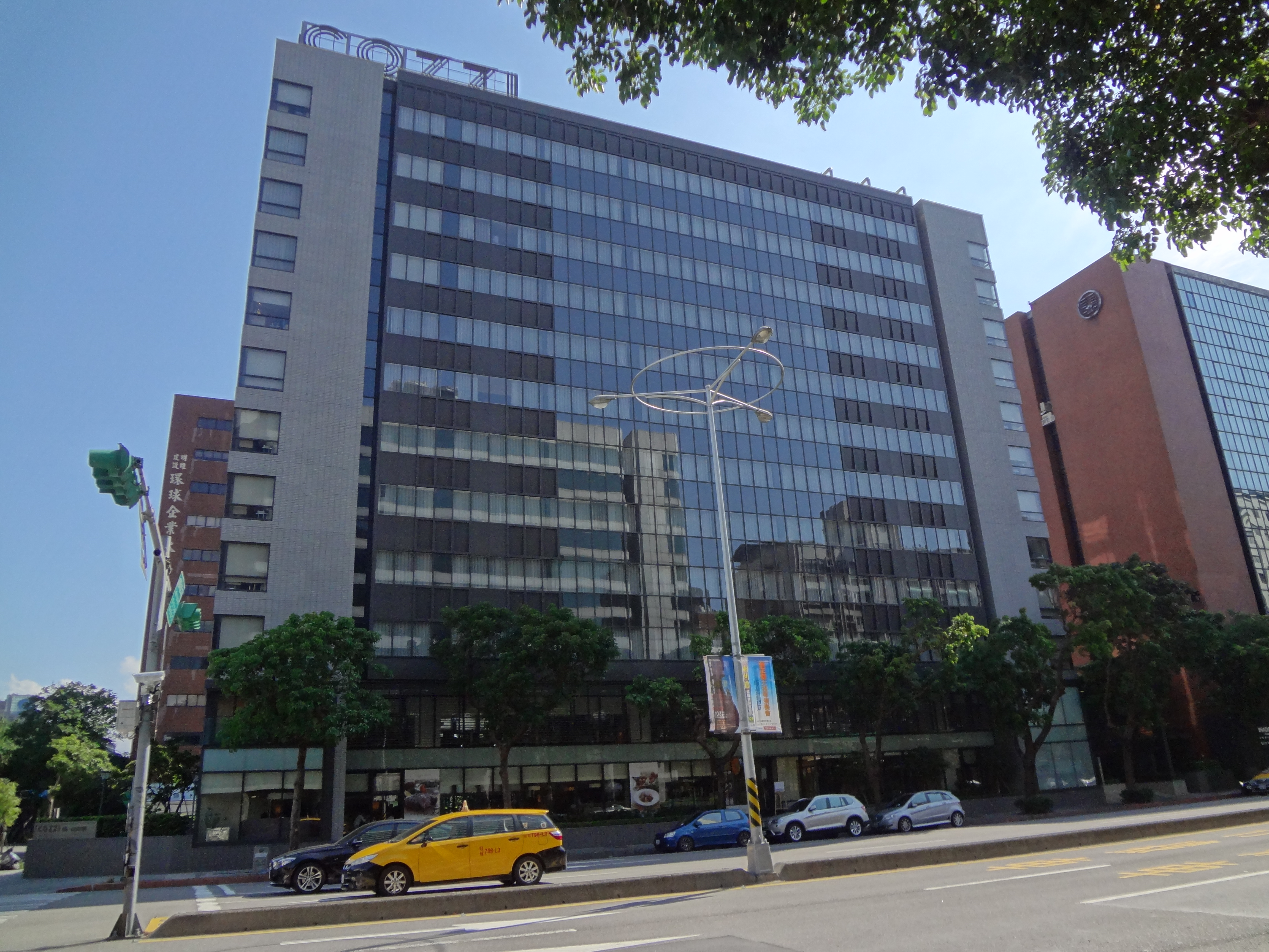 中文（台灣）: 國泰商旅和逸台北民生館，地址：臺北市中山區民生東路二段178號。